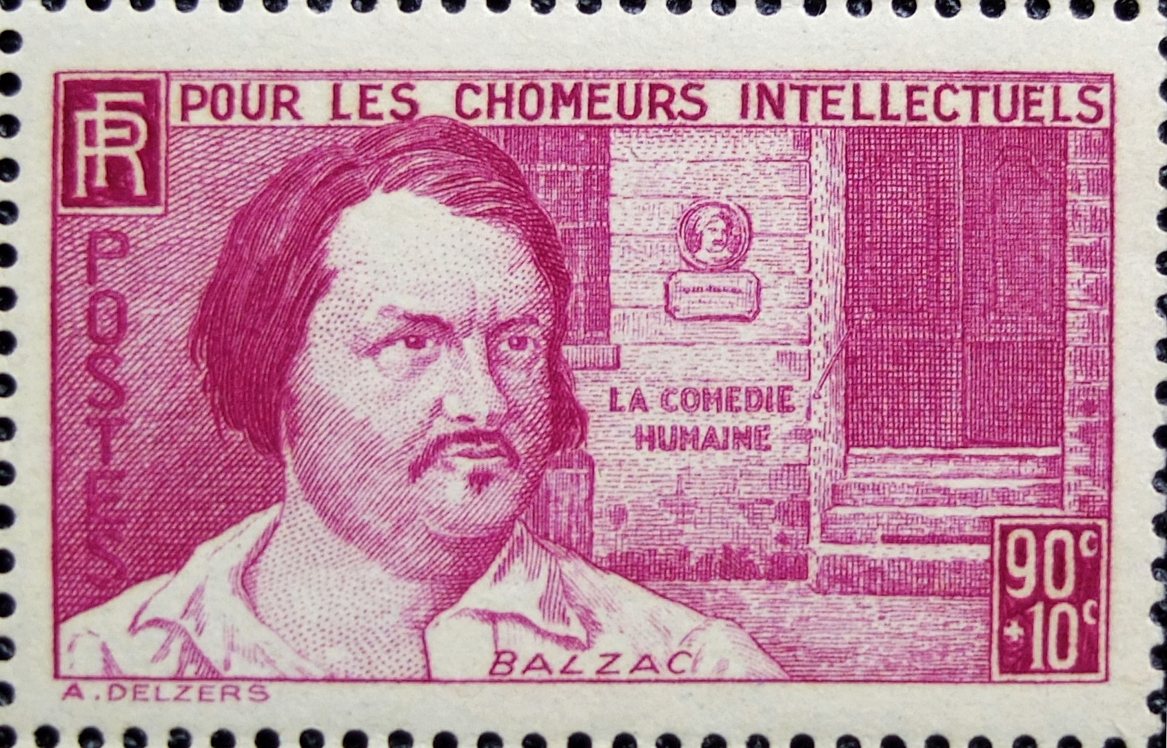 Timbre français à surtaxe 0,90 + 0,10 fr. au profit des Chômeurs intellectuels émis en 1939 à l'effigie d'Honoré de Balzac. Taille douce par Antonin Delzers.